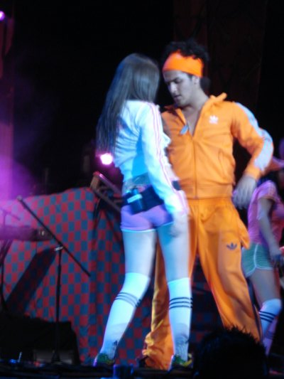 Belinda con su bailarín en el Auditorio Coca Cola en Monterrey Nuevo León, durante su gira Utopía